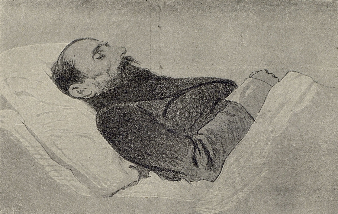 Иван Саввич Никитин (1824-1861) — русский поэт. На смертном одре.